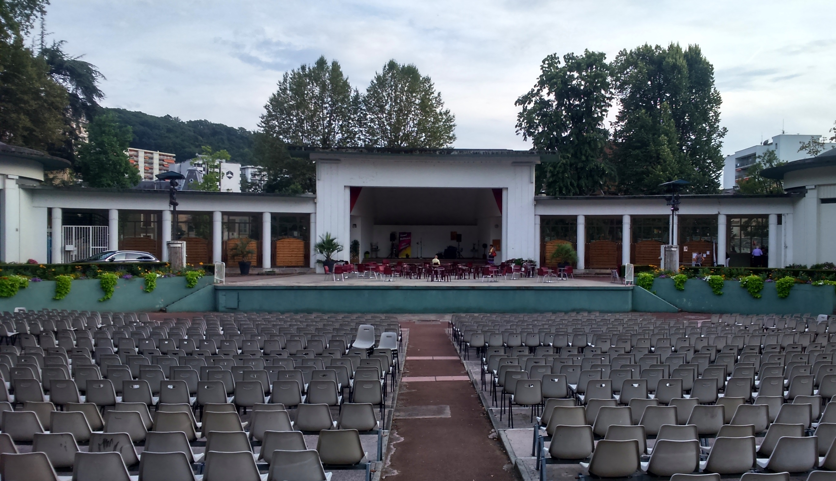 La scène du théâtre de verdure dans le Parc floral des Thermes (lieu inscrit au titre des monuments historiques) à Aix-les-Bains (Savoie).